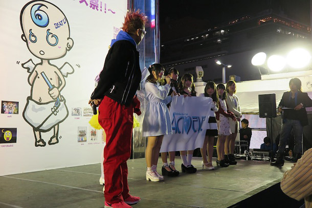 BEATLINE_ACTEVE